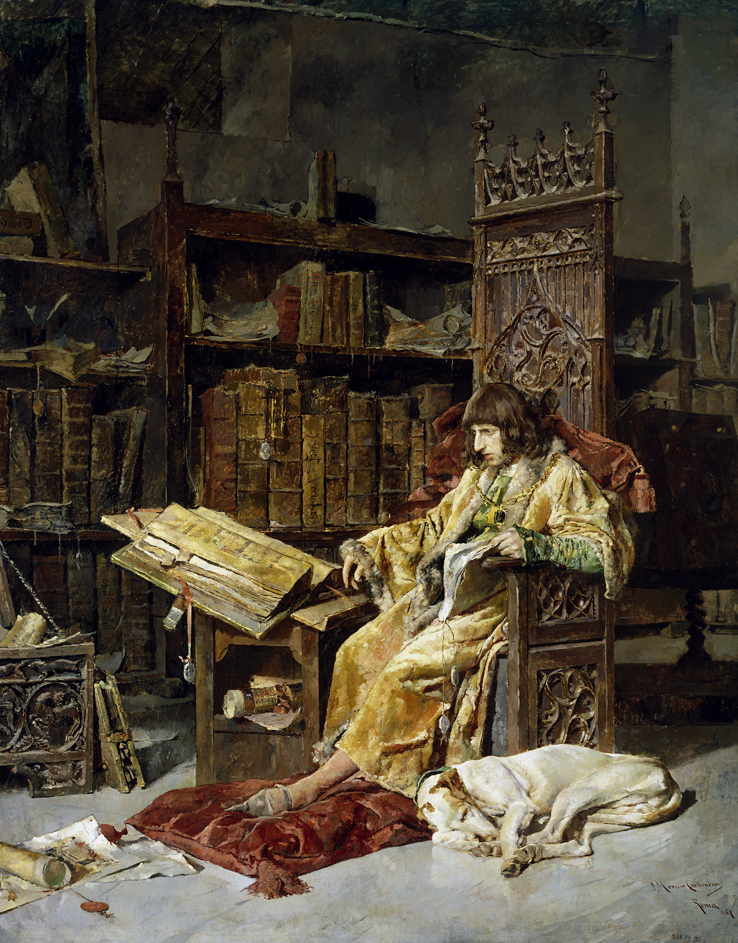 La obra representa al príncipe Carlos de Viana (1421-1461), que fue hijo del rey Juan II de Aragón, de quien se sospecha que ordenó su envenenamiento, y de la reina Blanca I de Navarra.